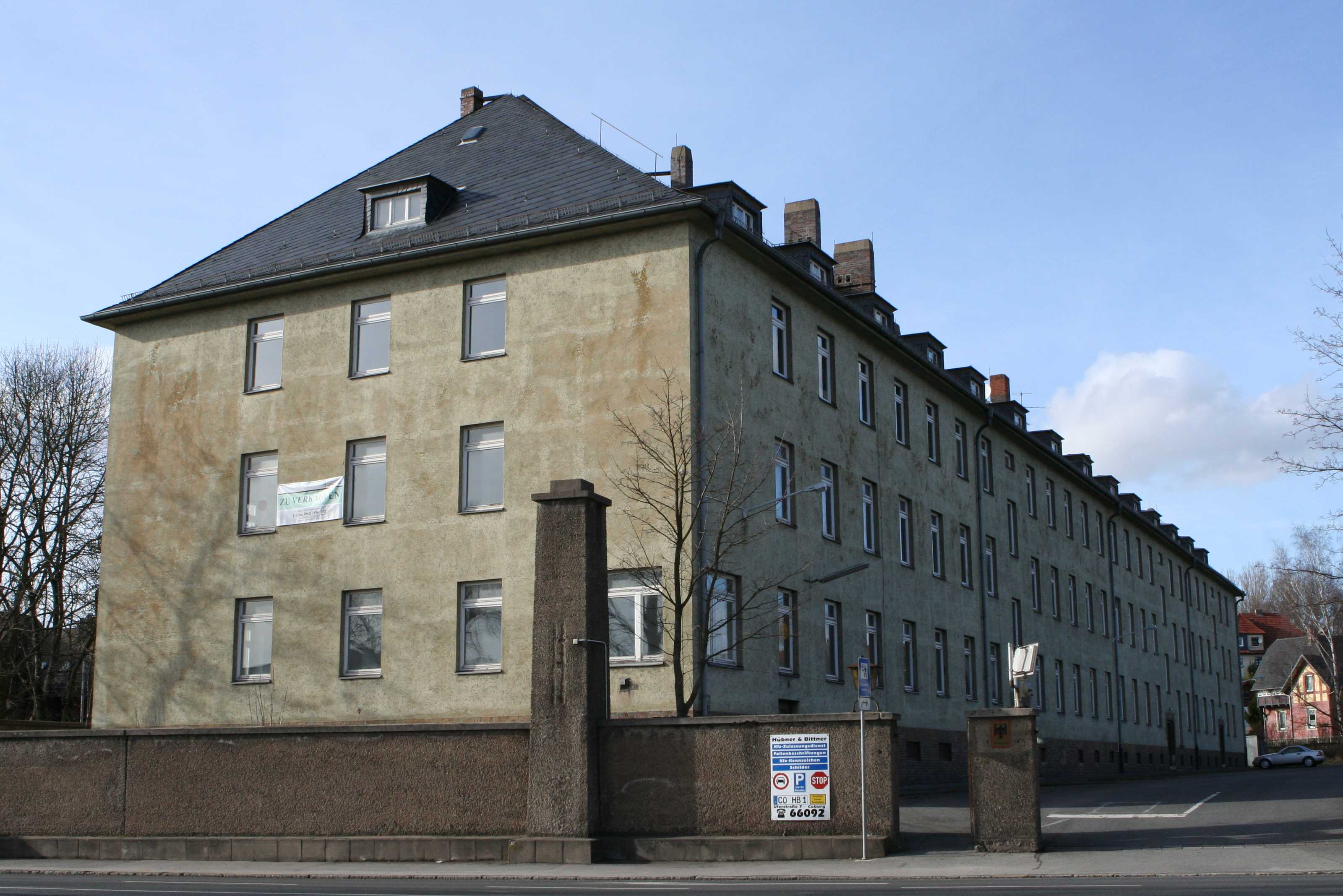 Ehemalige Von-Berg-Kaserne in Coburg